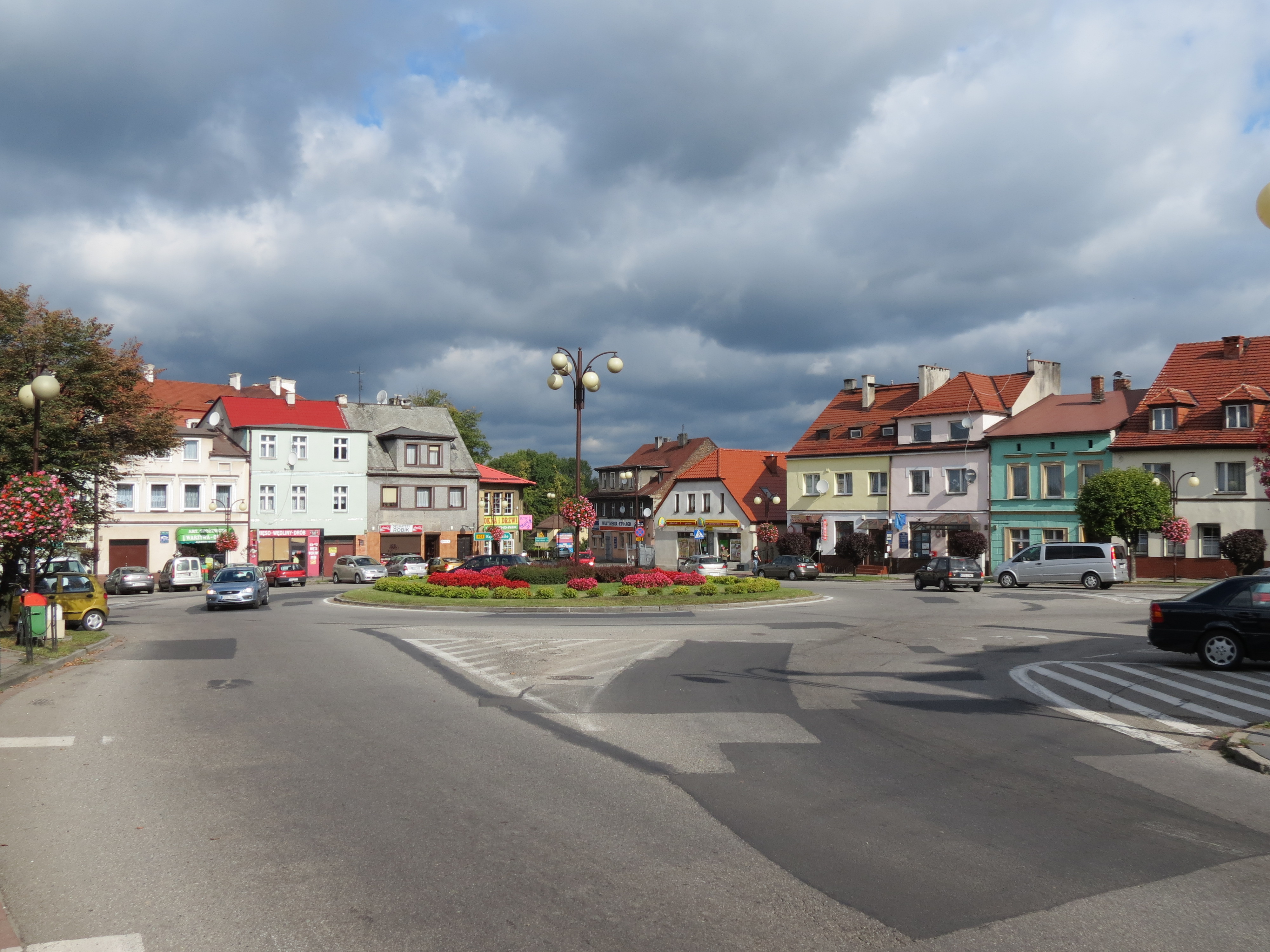 Układ urbanistyczny z centralnie położonym rynkiem; Sośnicowice, pow. gliwicki